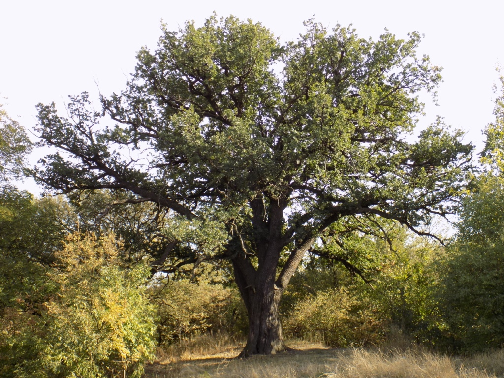 Сичин Дуб, Покровський р-н, Михайлівська сільська рада